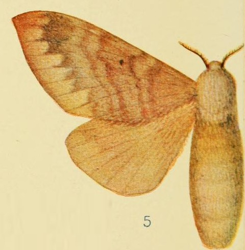 Gastroplakaeis schultzei